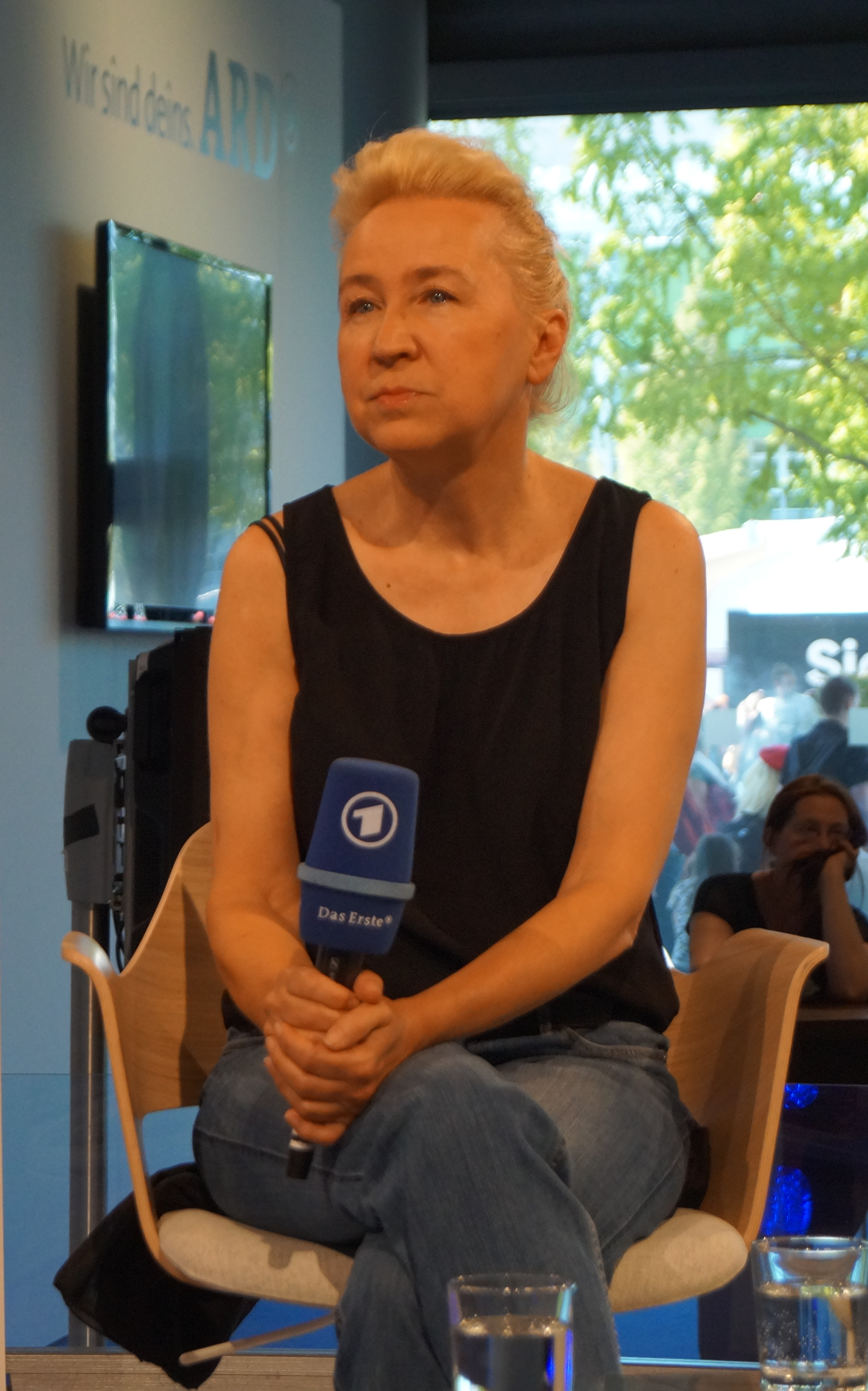 Frankfurter Buchmesse 2018